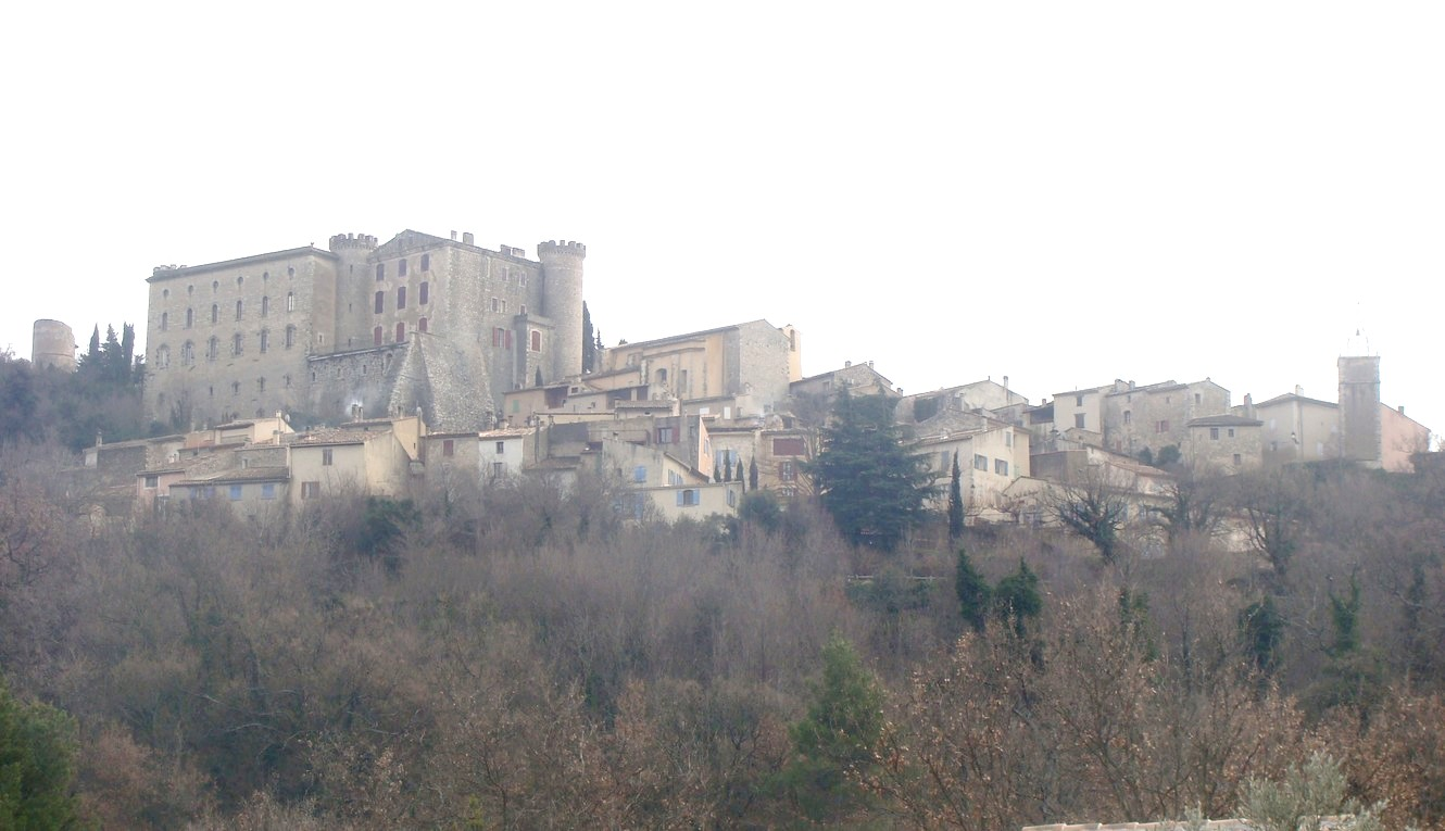 Saint-Martin (Var), vue générale